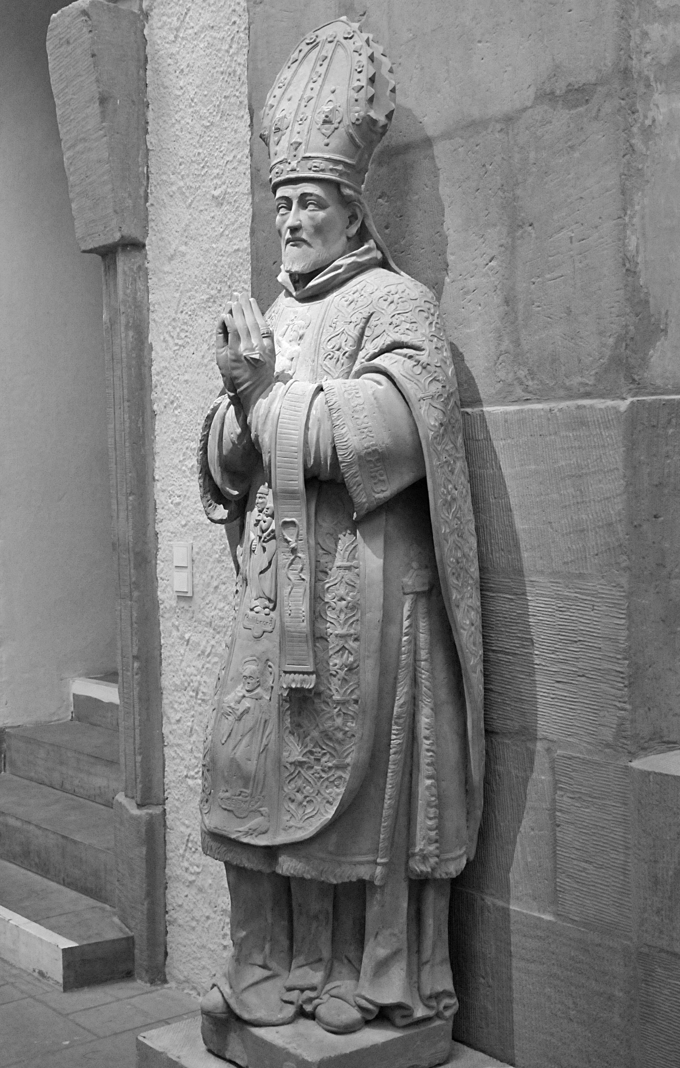 D'Statu vum Abt Pierre Richardot (1575-1628) an der Basilika zu Iechternach.